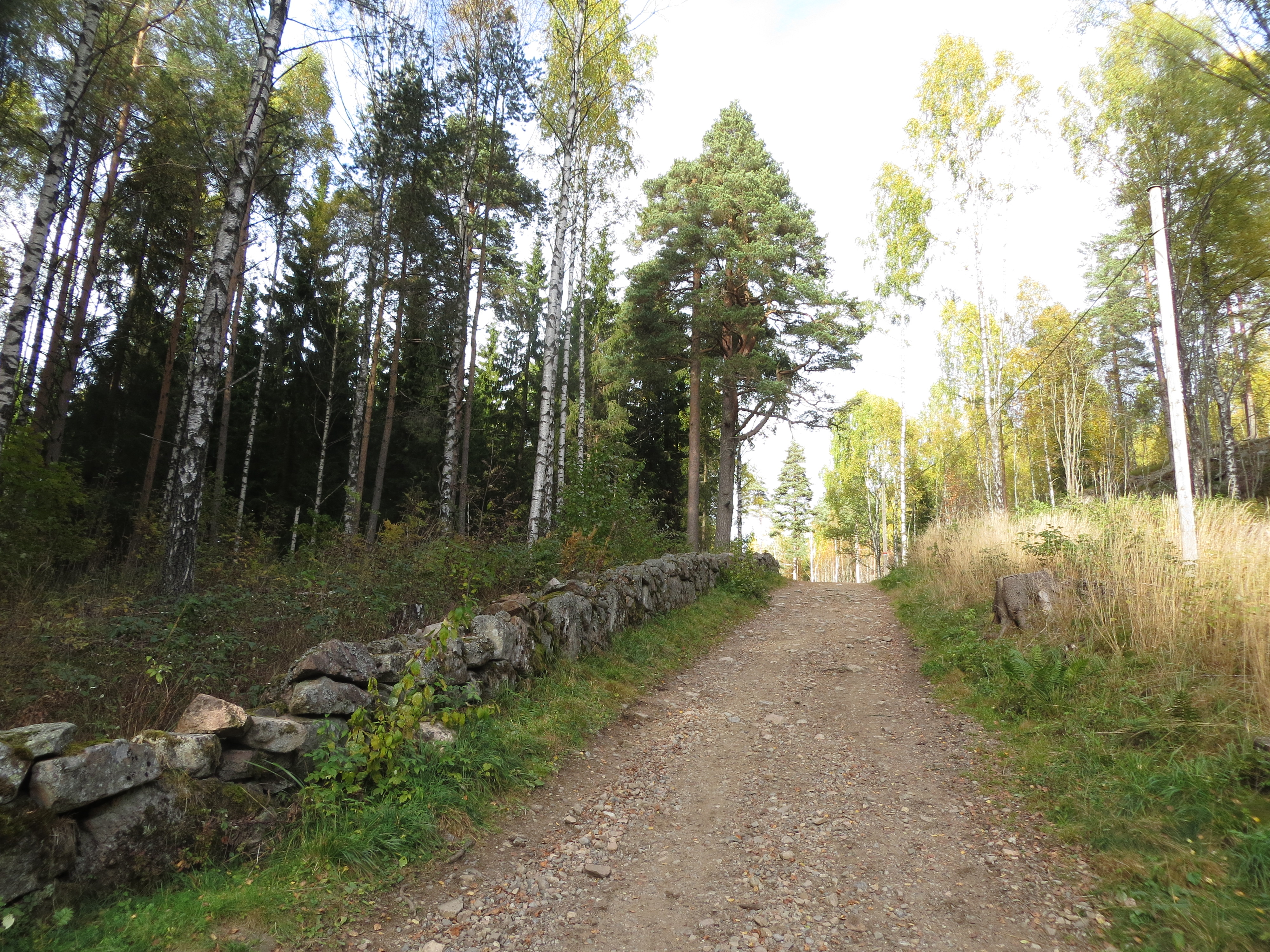 Gamlevegen fra Bogstad og Bogstadvannet til husmannsplassene i øst. Vegen har kulturminnevern fra riksantikvaren. Bydel Vestre Aker, Oslo.